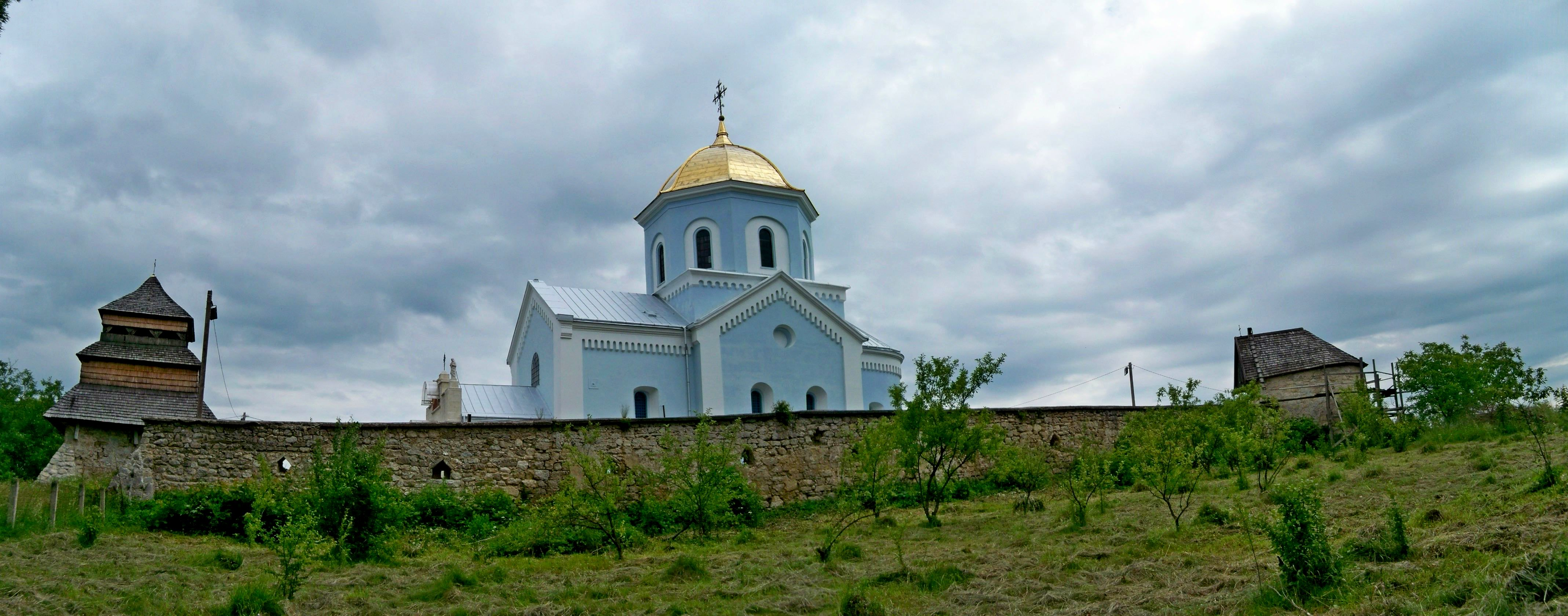 Церква Різдва Богородиці (мур.), с.Піски